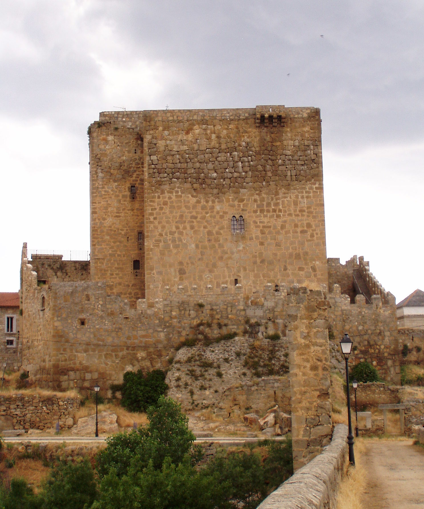 Castillo medieval de la villa salmantina de Puente del Congosto